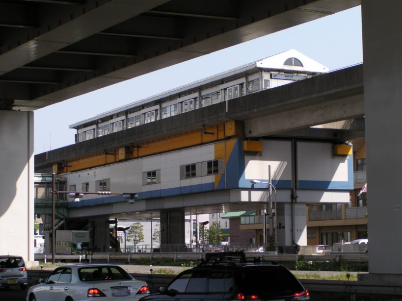 2005年4月17日に投稿者がja:南部市場駅で撮影。